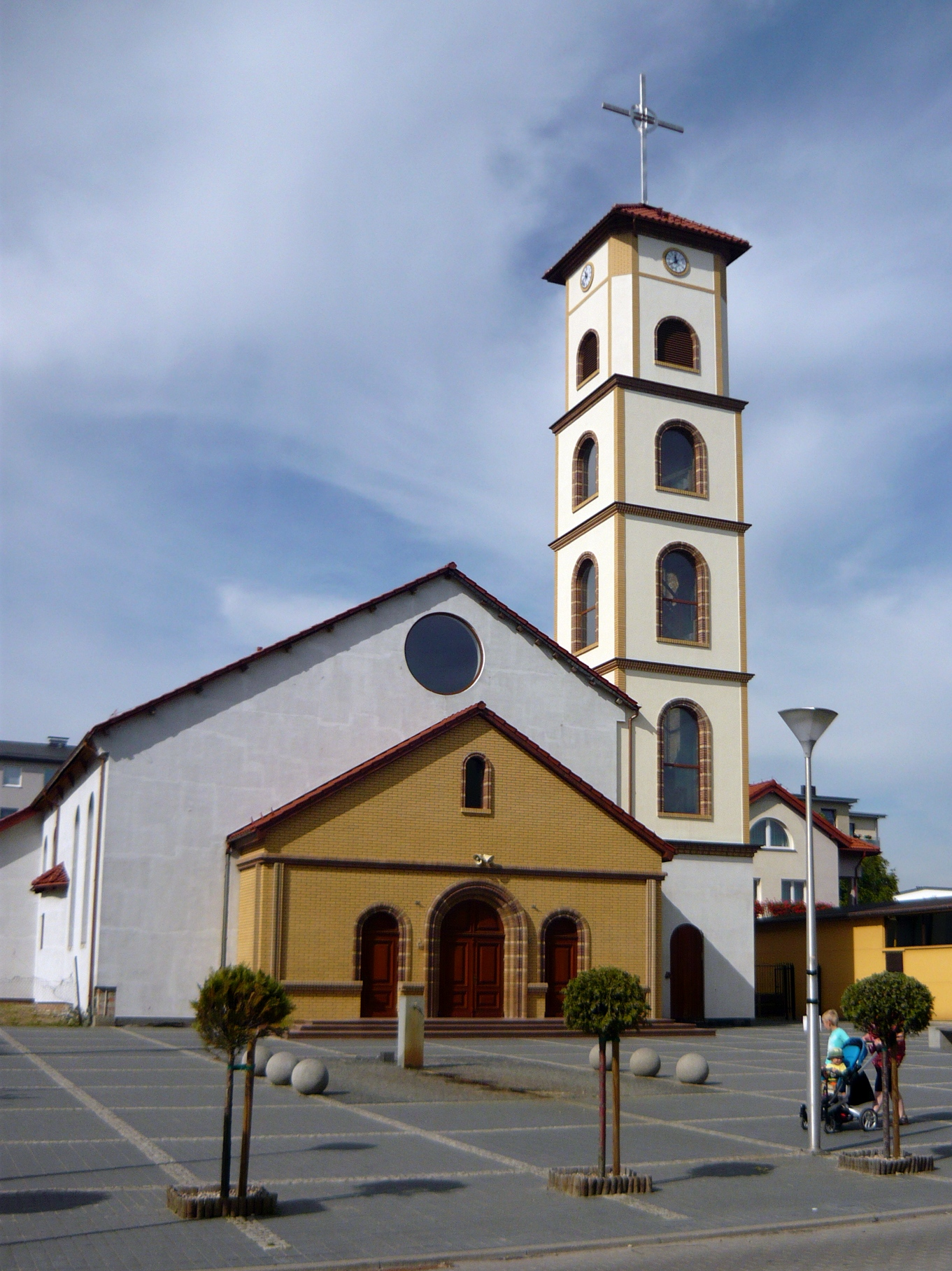 Kościół św. Antoniego Padewskiego w Redzie.